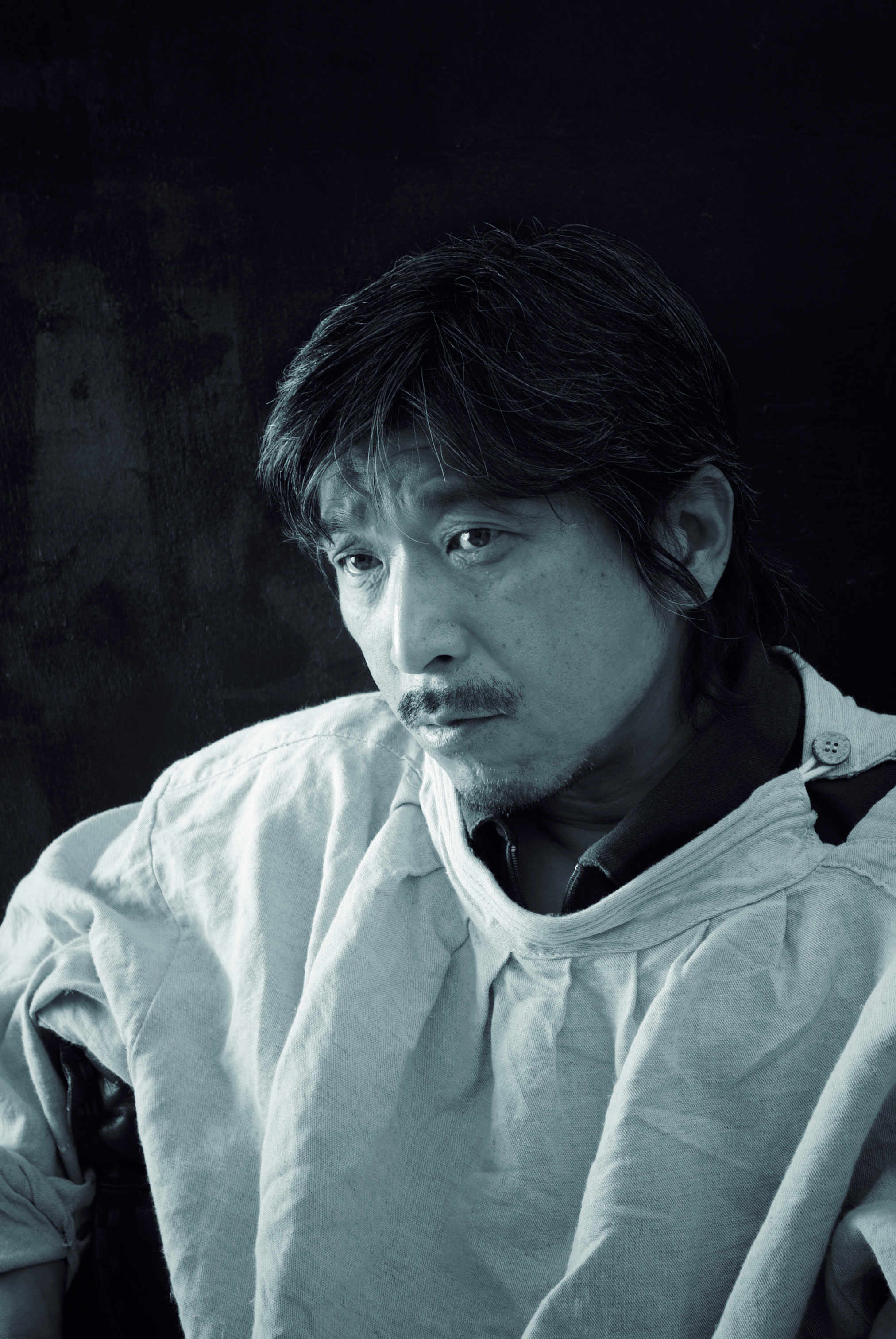 山本祐嗣 1958